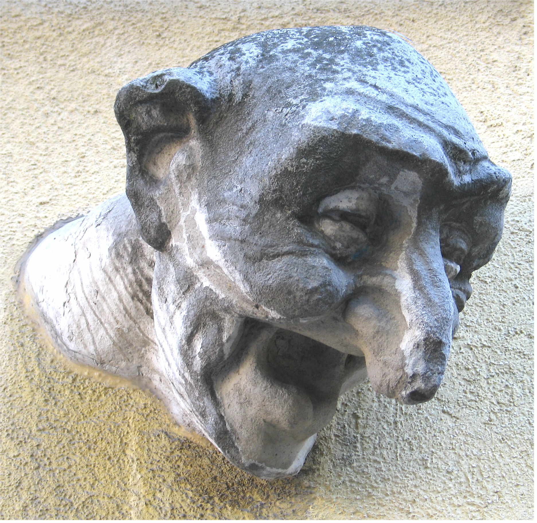 De Kapp dee fréier iwwert der Entrée vum Ciné de la Cour war.